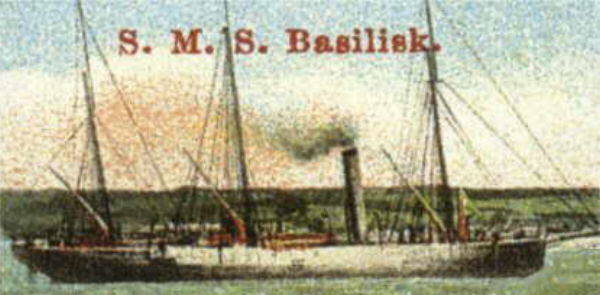 Das Kanonenboot SMS Basilisk der preußischen Marine, in Dienst 1862 bis 1876, zeitgenössische Darstellung